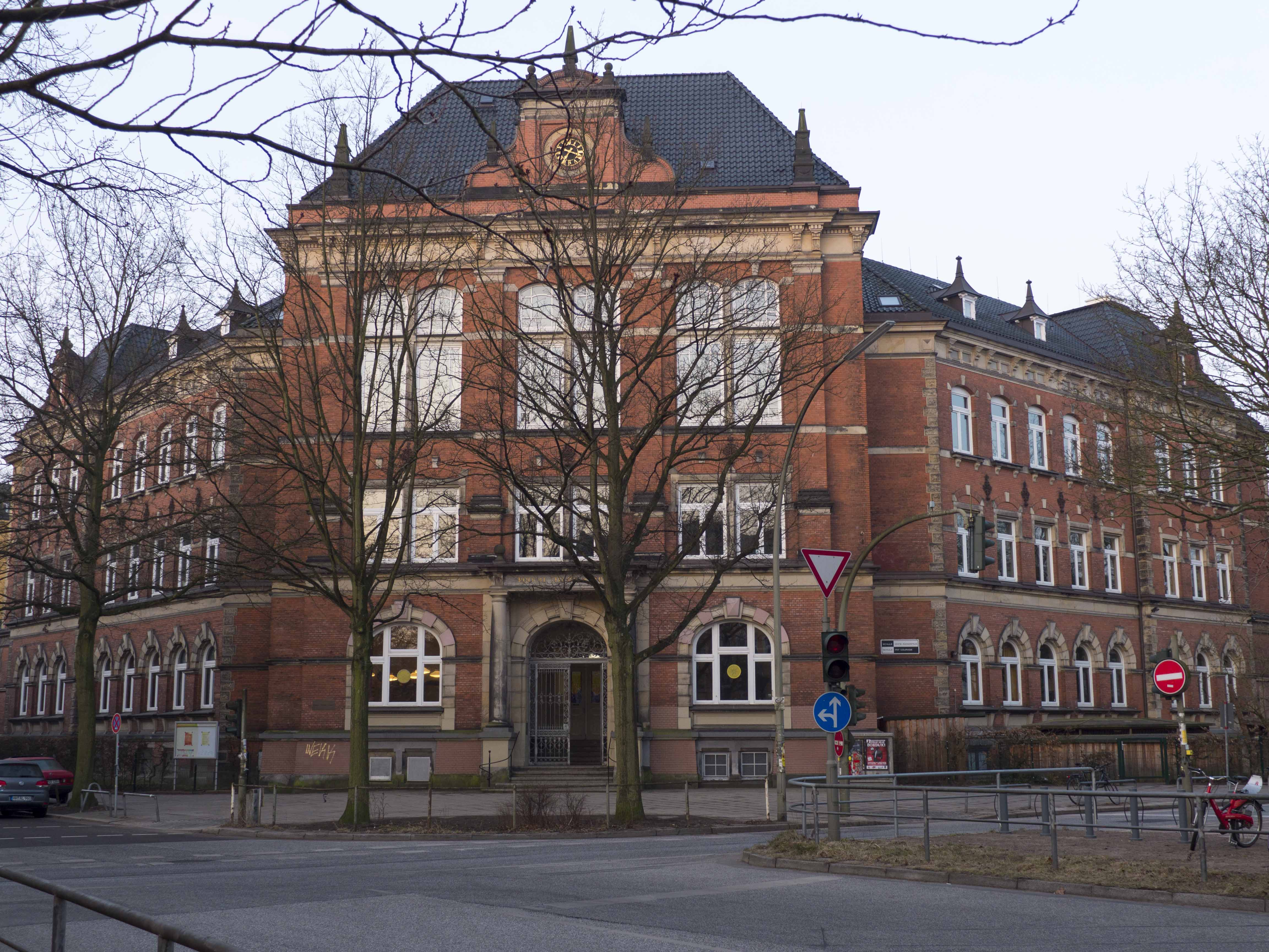 Rudolf Steiner Schule Altona, Ecke Bleickenallee / Fischersallee This is a photograph of an architectural monument.